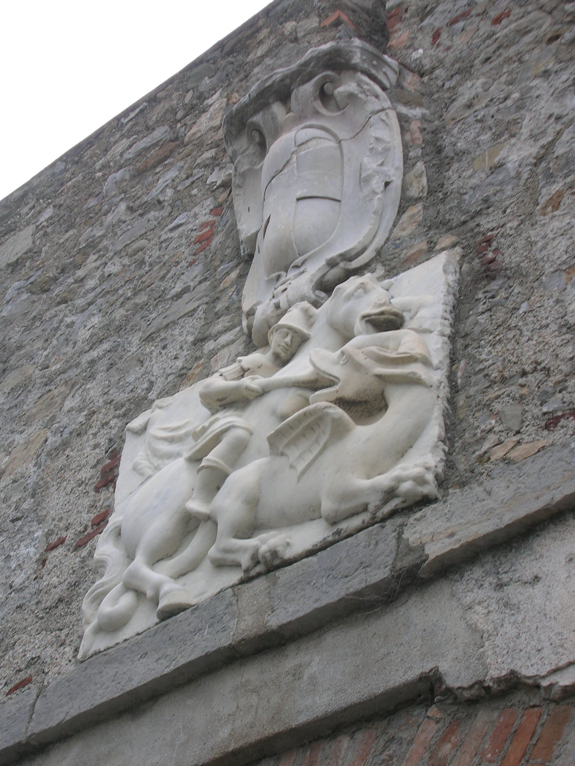 La Spezia - Castello San Giorgio - lo stemma della Repubblica genovese e di San Giorgio